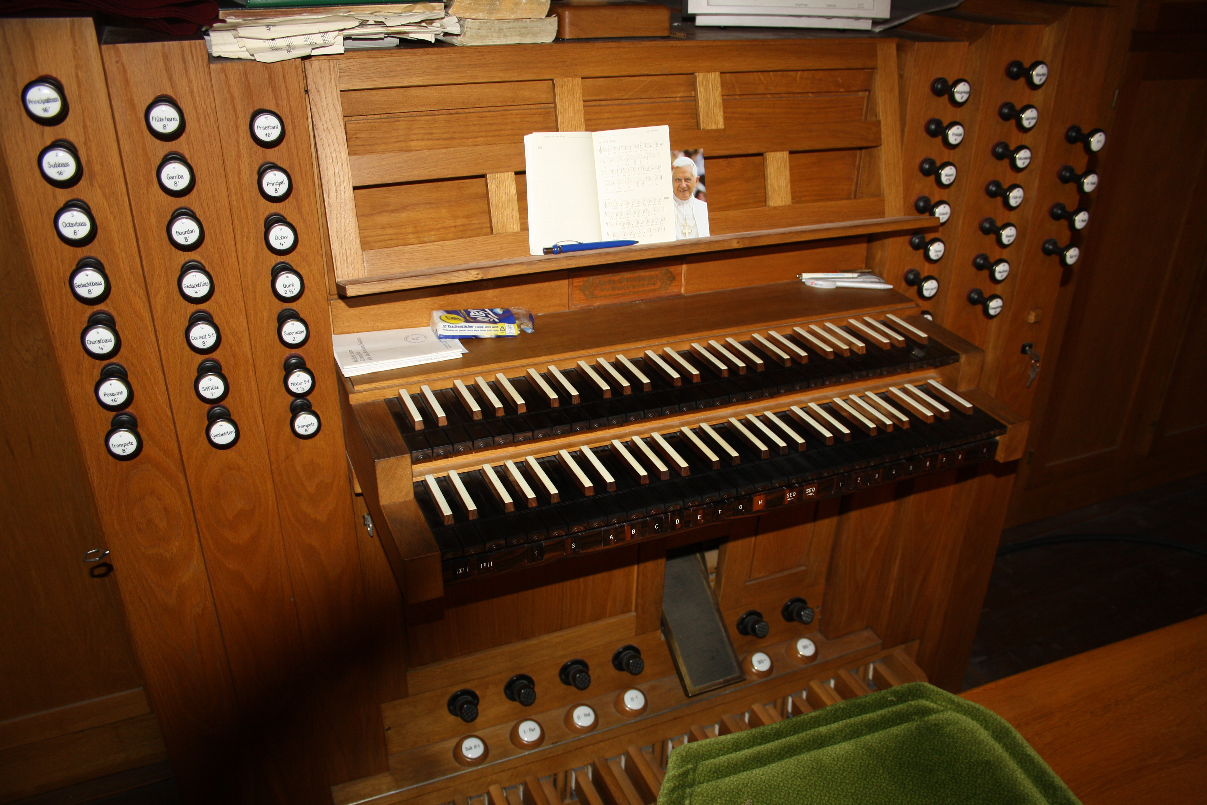 Spieltisch Orgel Biblis